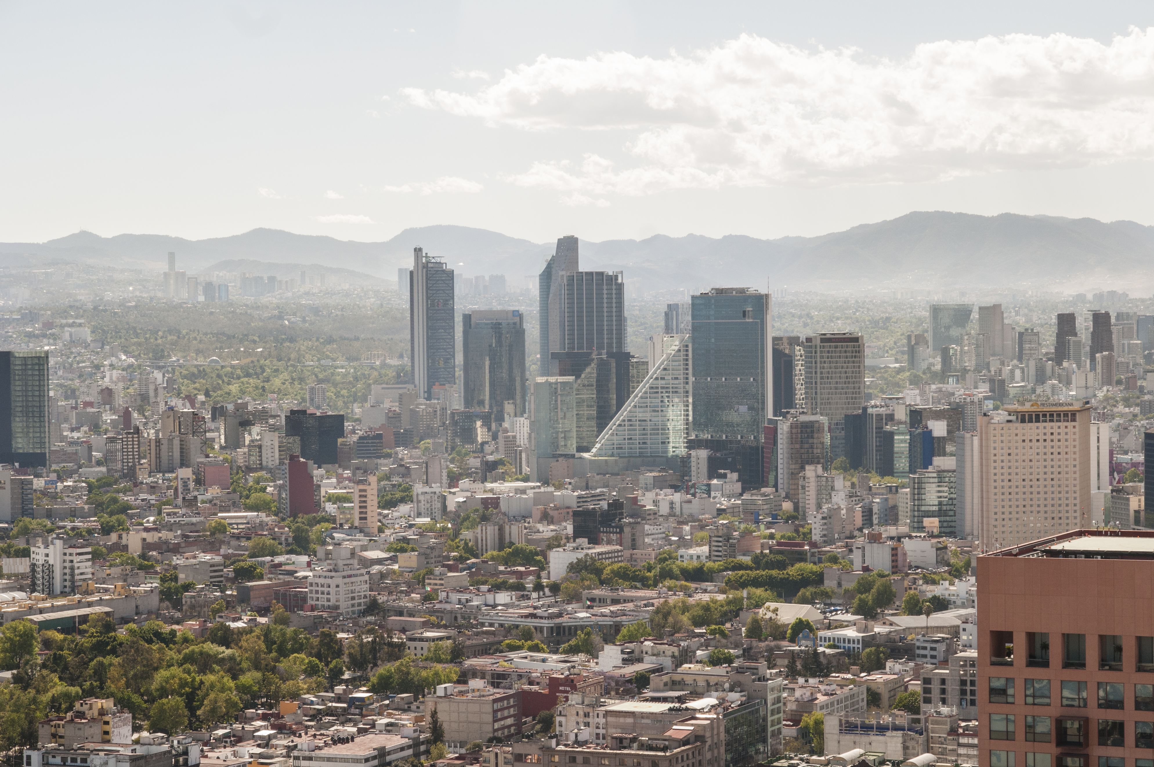 Skyline CDMX 2016